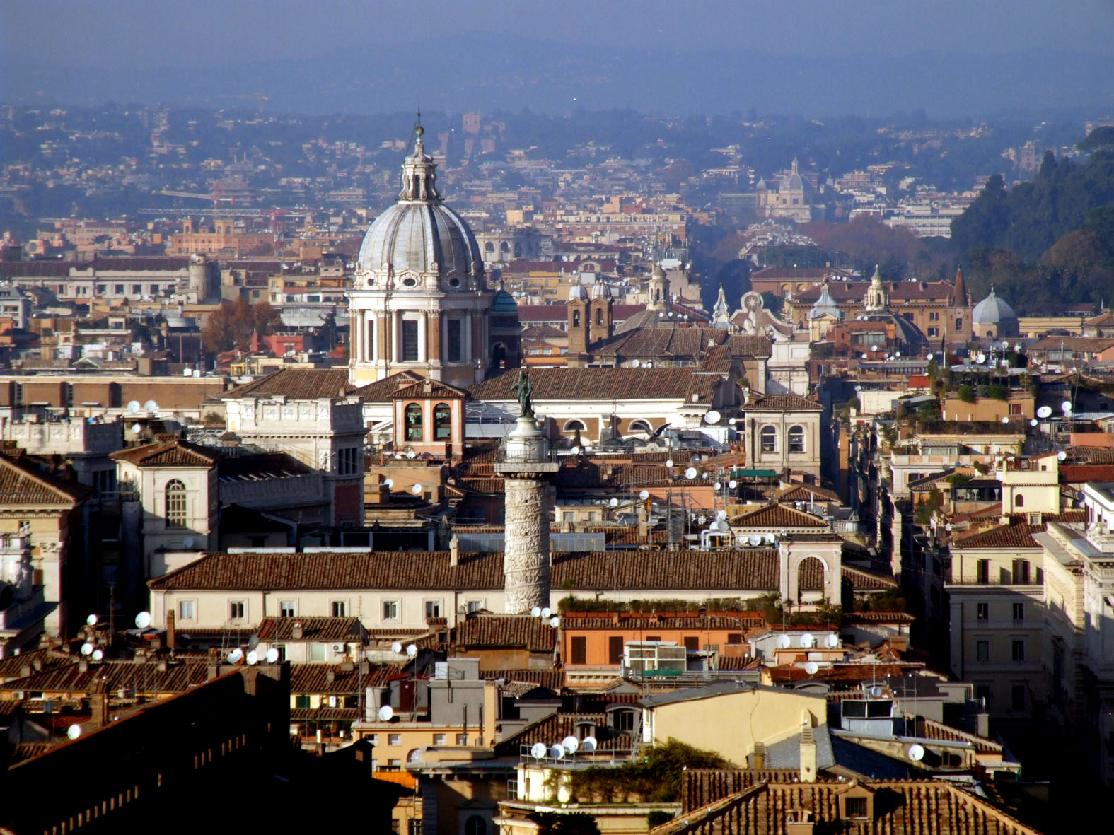 San Carlo al Corso, Roma, dal Vittoriano